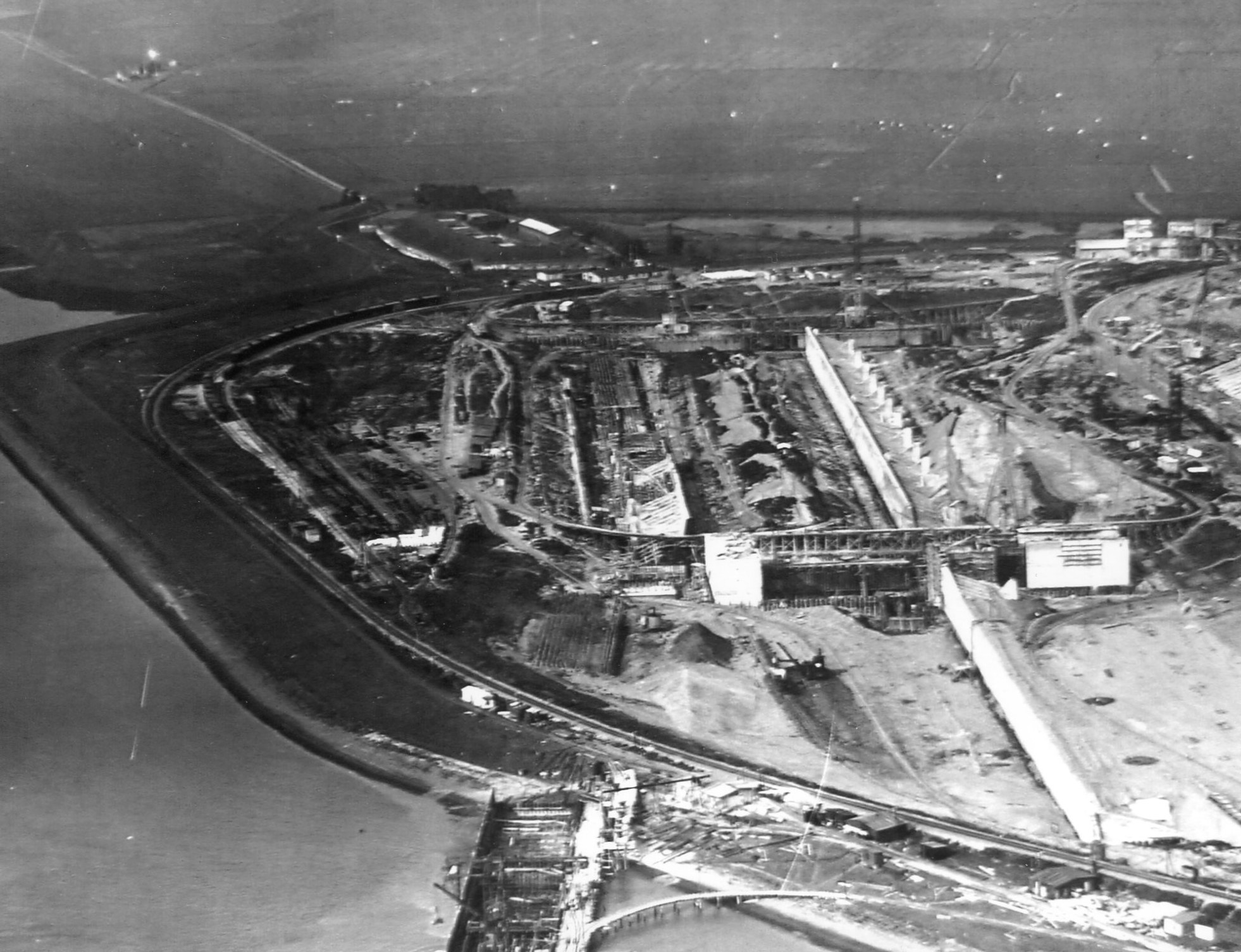 Luftaufnahme vom Bau der Nordschleuse, am nördlichen Rand der Baustelle steht noch das Weserfort Brinkamahof I.